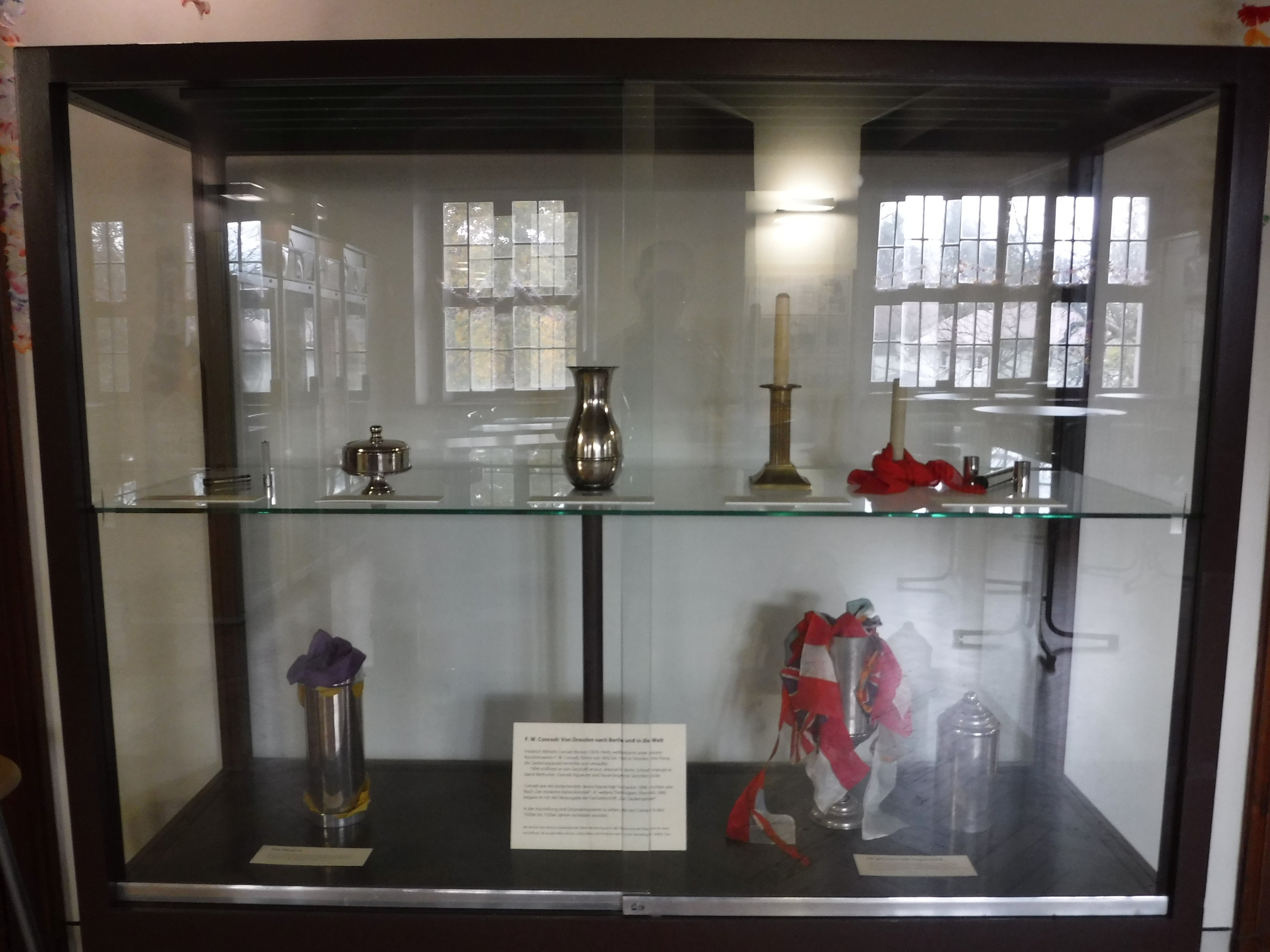 Das denkmageschützte Renaissance-Schloss Schönfeld in Dresden. Zaubereimuseum in alten Vitrinen aus dem Dresdener Grünen Gewölbe mit Exponaten von Conradi-Horster